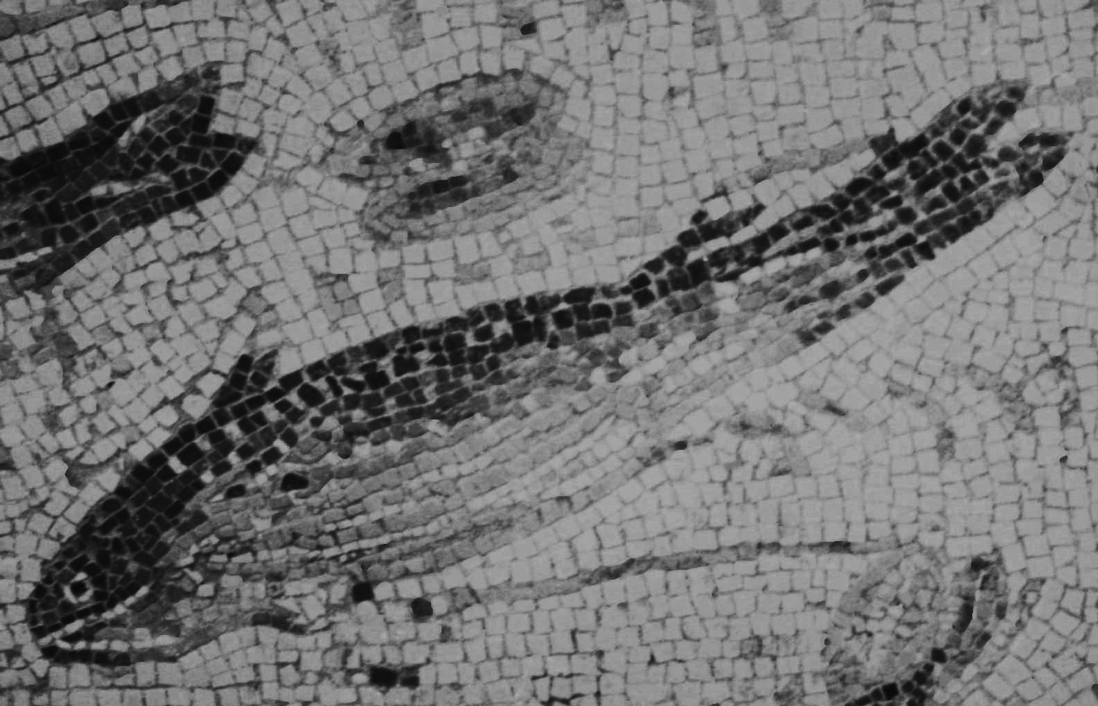 détail d'une mosaïque romain trouvée sur le site archéologique d'Alba-la-Romaine, Ardèche, France